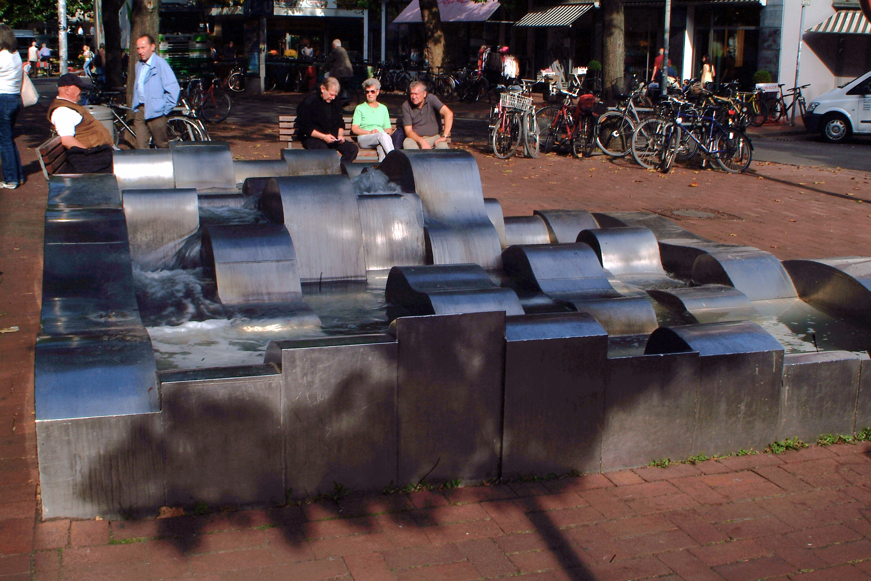 Der Brunnen auf der Lister Meile in Hannover Ecke Sedanstraße. Laut der am Brunnen angebrachten Tafel ist dies der "Lüders-Brunnen / - Wassergarten - / Errichtet 1974 aus Mitteln der Stiftung / des Schlossermeisters Henry Lüders / Geschaffen von dem Bildhauer Joachim Wolff" ...